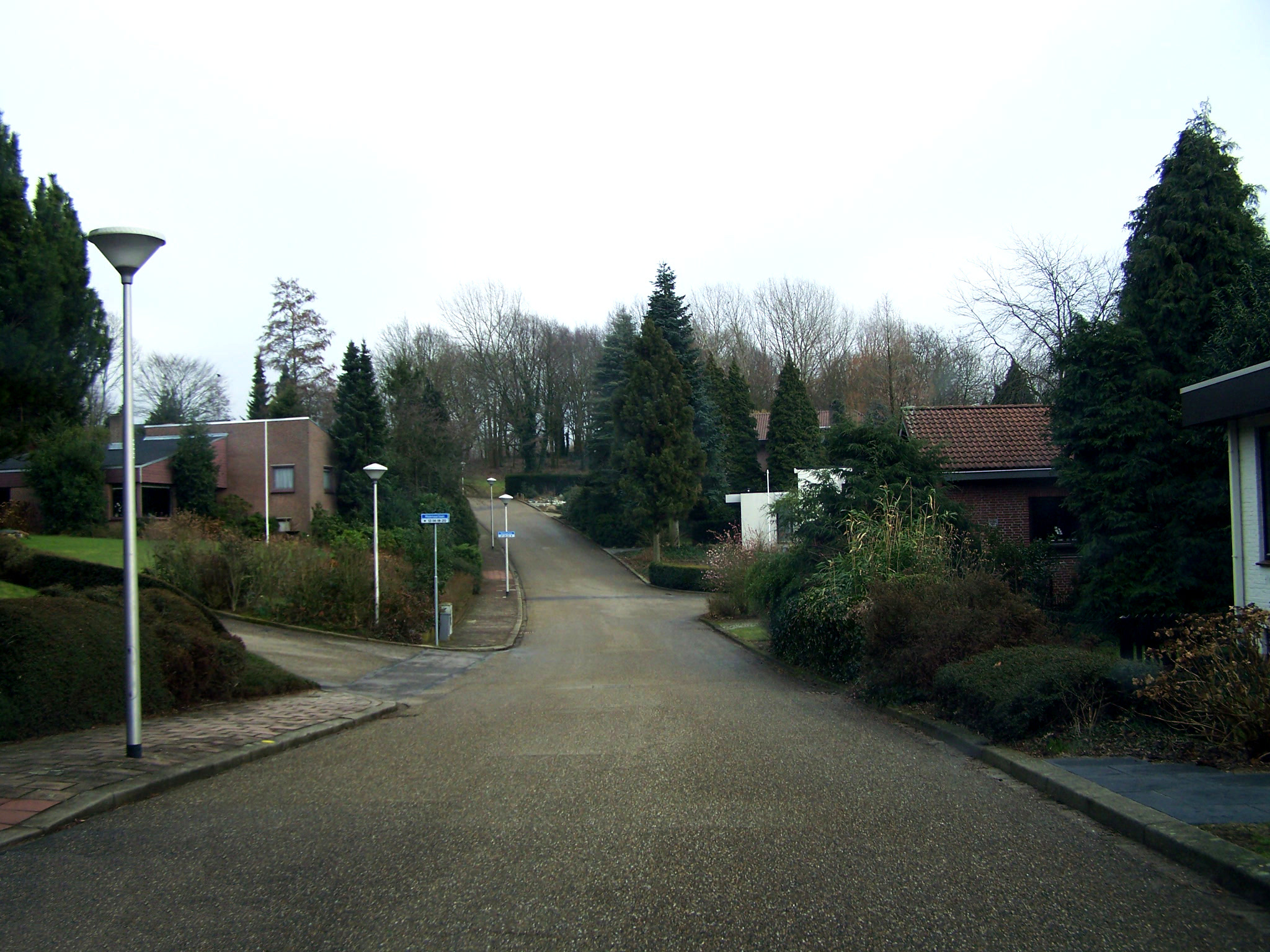 Drehort Flodders: Molenaarlaan Sittard Niederlande - Die Verfolgungfahrt